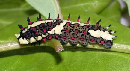 Chilasa clytia caterpillar, India